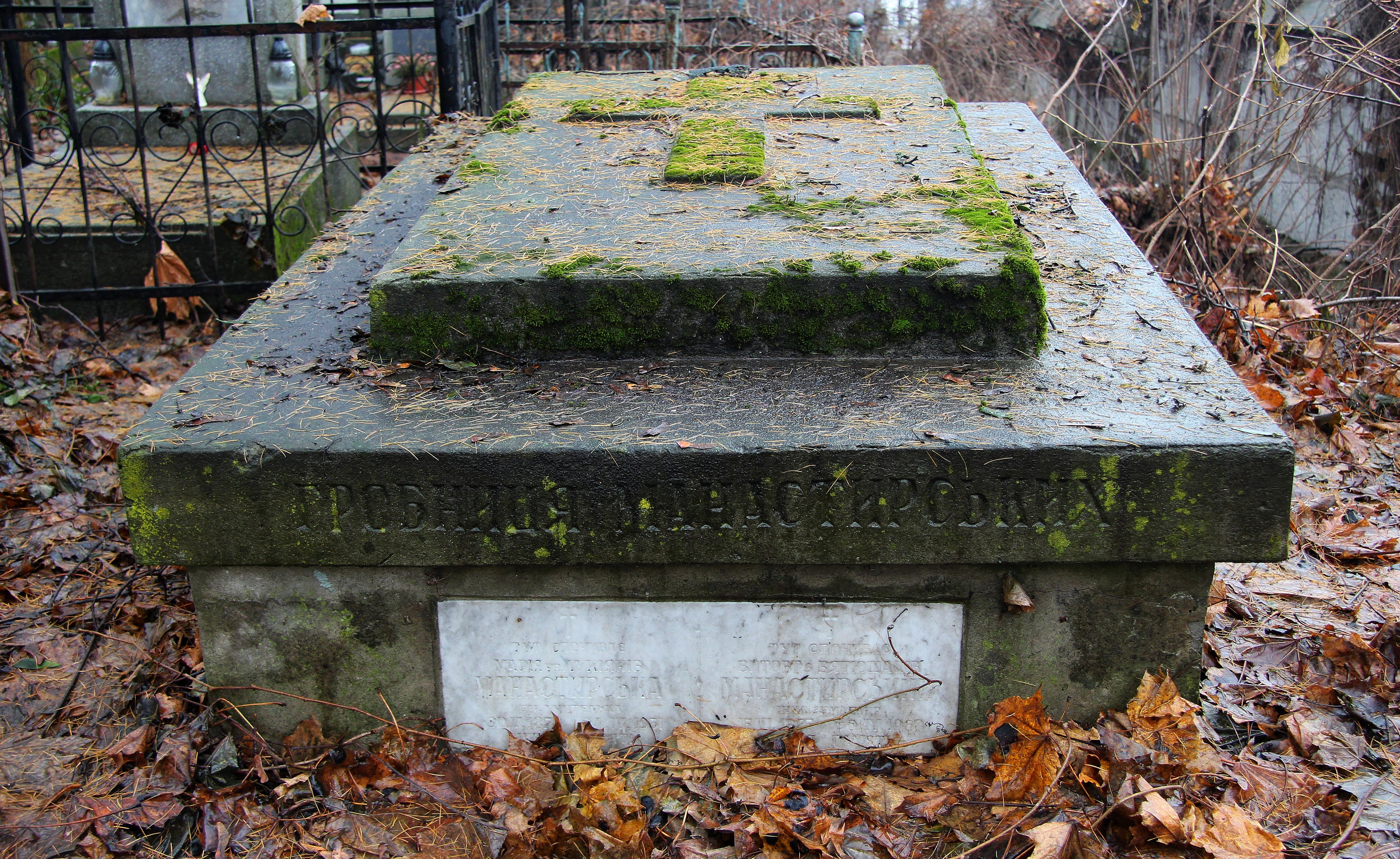 Гробниця Манастирських.Личаківський цвинтар , 45 поле.